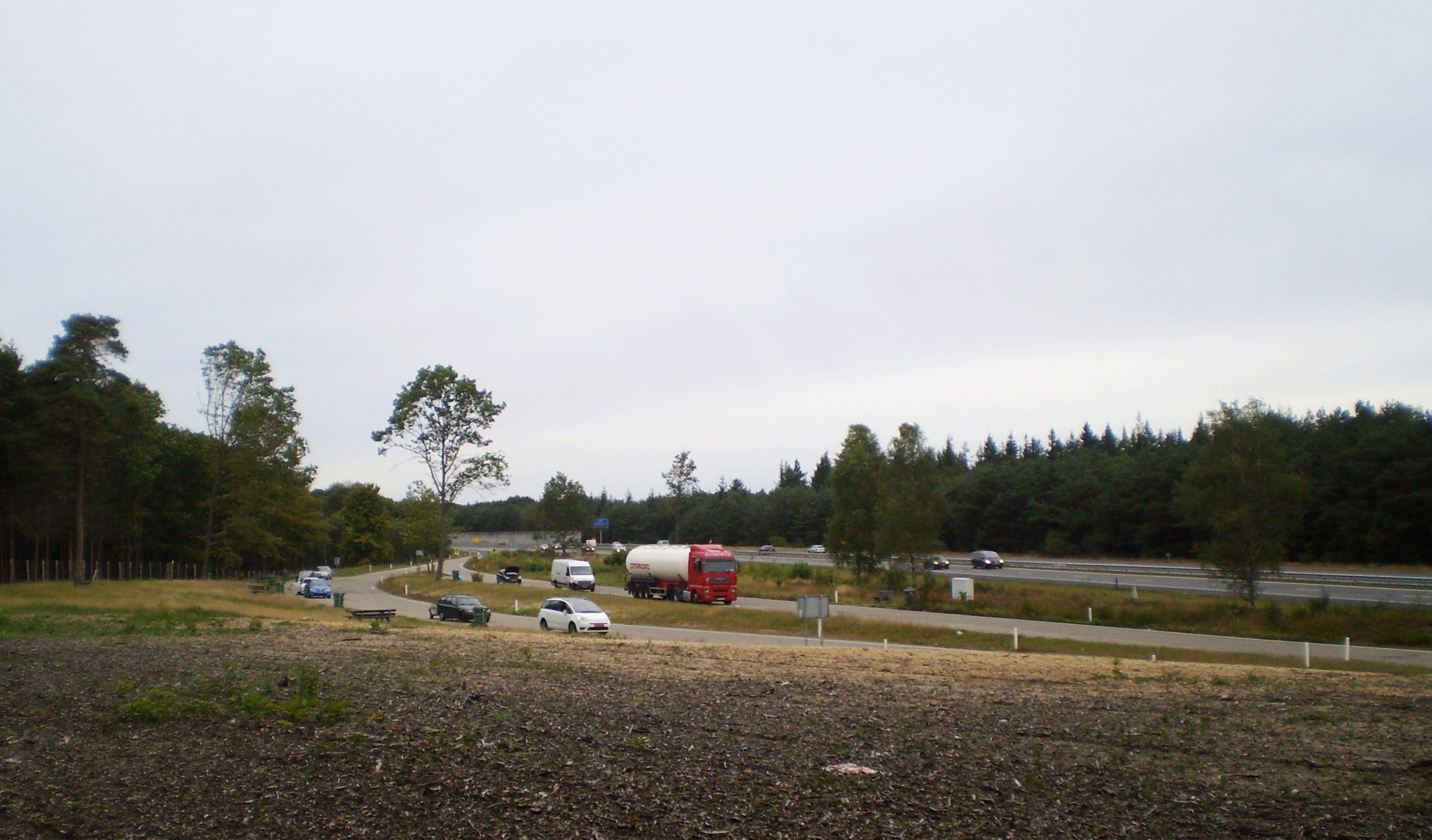 Verzorgingsplaats Bruggelen langs de A1 bij Apeldoorn